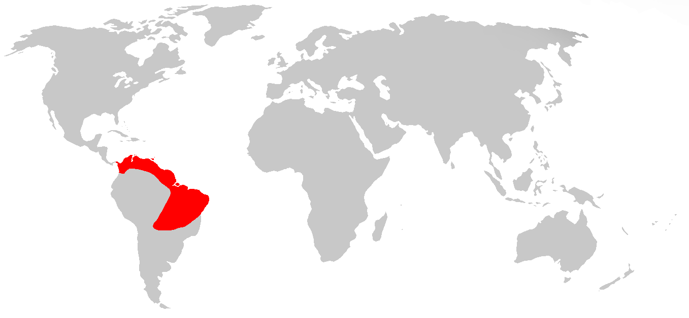 Chrysolampis mosquitus Lizenz